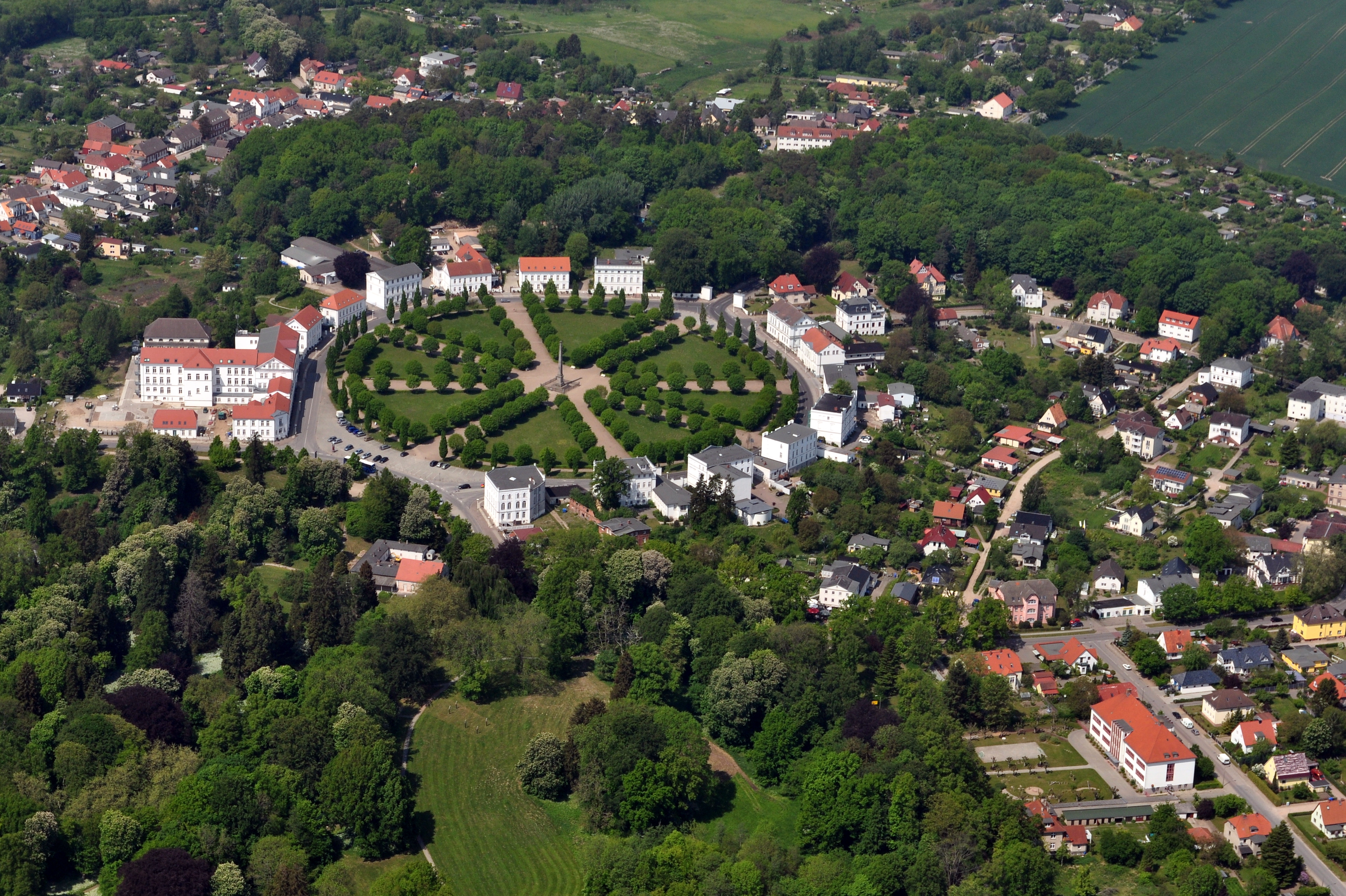 Die Bilder wurden von mir während eines einstündigen Rundflugs ab Flugplatz Güttin am 21. Mai 2011 aufgenommen. Die Bildbeschreibung steht im Dateinamen. Aufgenommen mit einer Nikon D5000 durch das Seitenfenster des Flugzeugs.